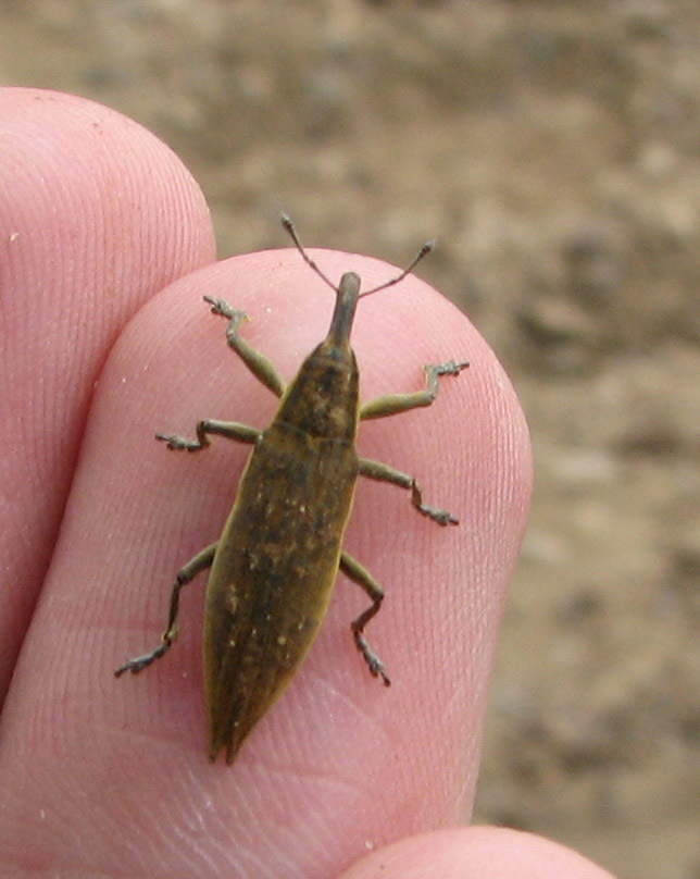 Lixus iridis